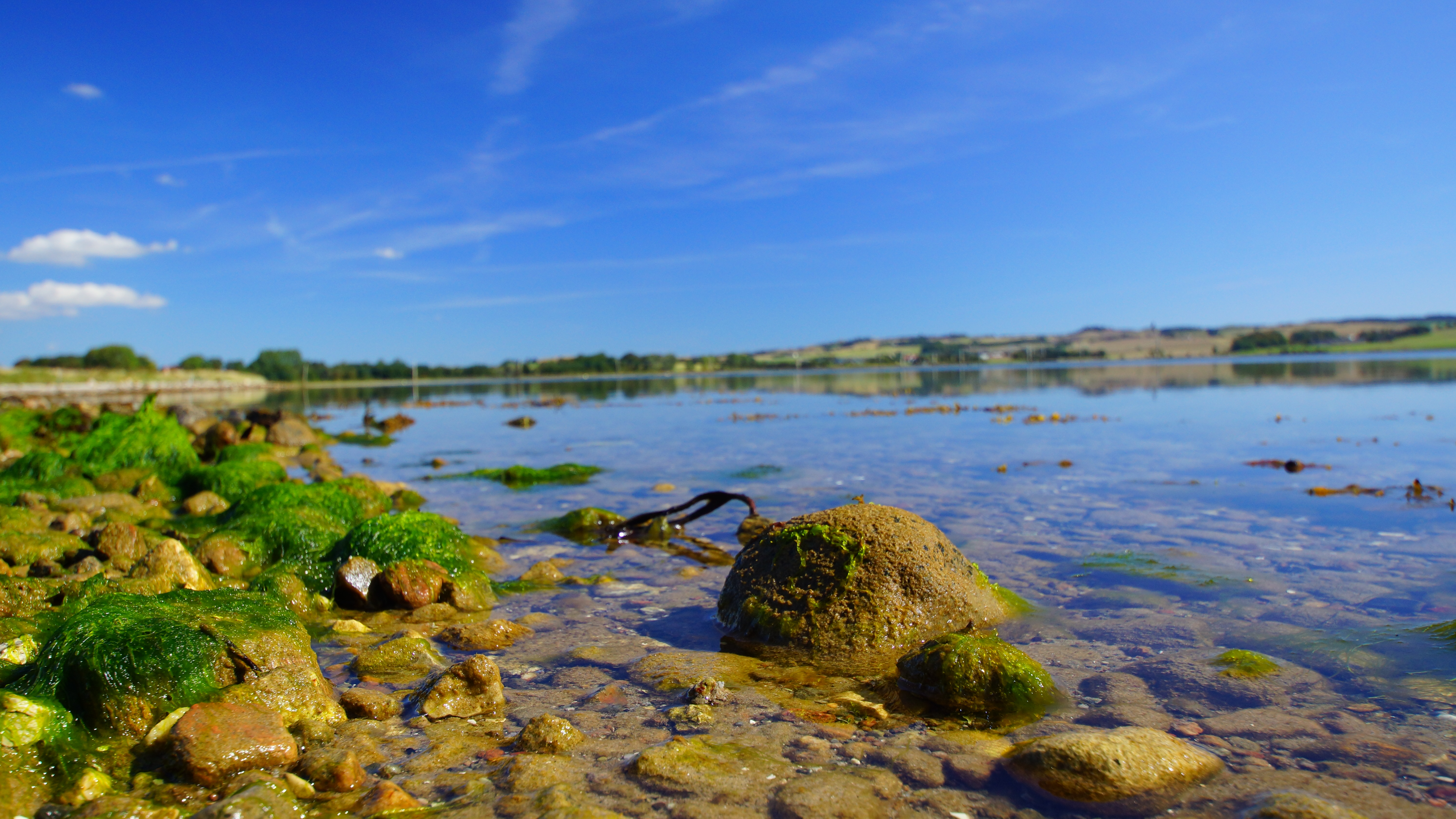 Knebel Vig, Sony